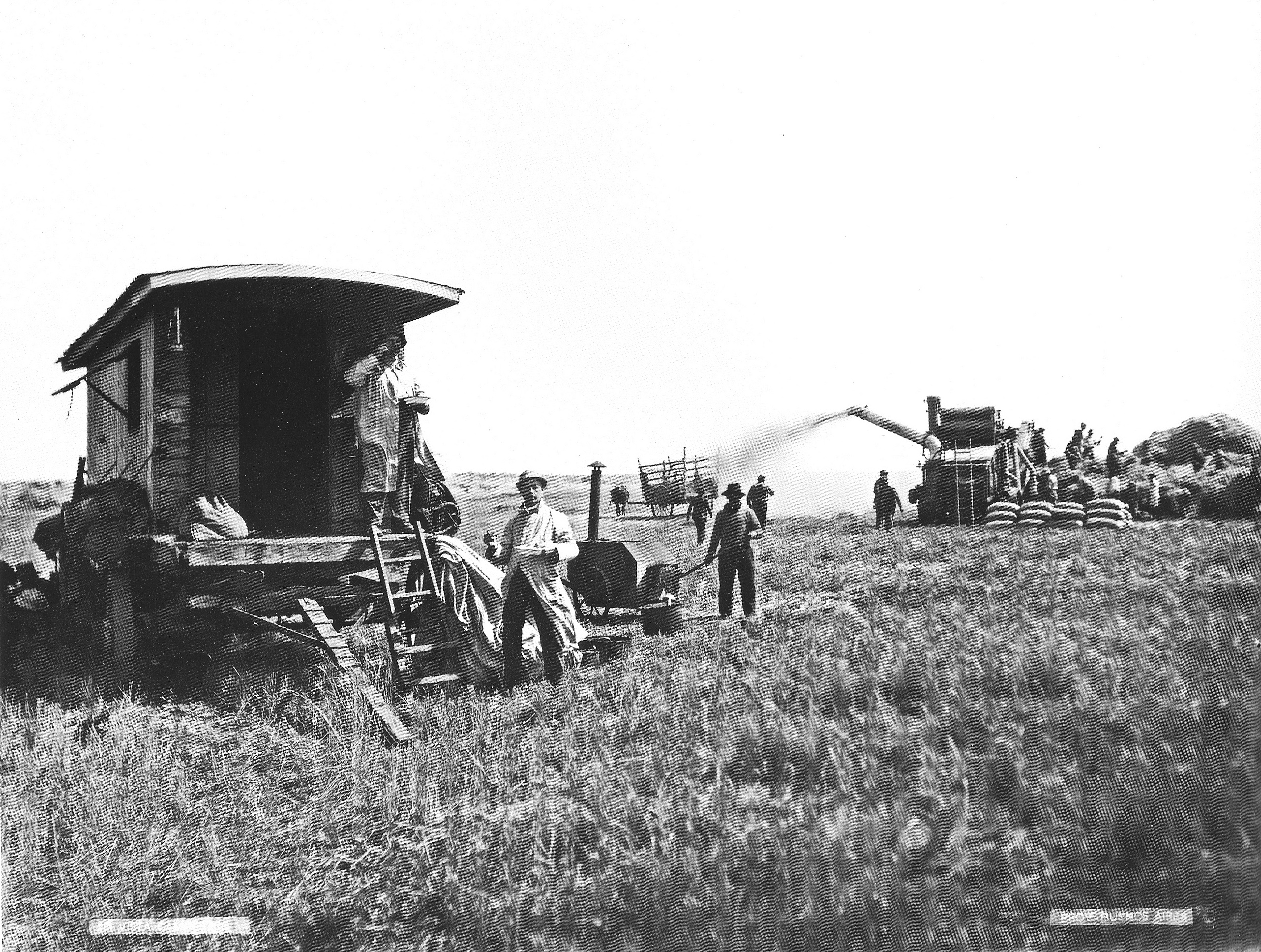 Vista campestre. Cosecha de trigo en la provincia de Buenos Aires.